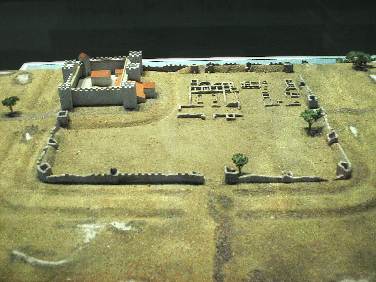 Modell (Maßstab 1:500) des spätantiken Restkastell Abusina im Germanischen Nationalmuseum, Nürnberg.